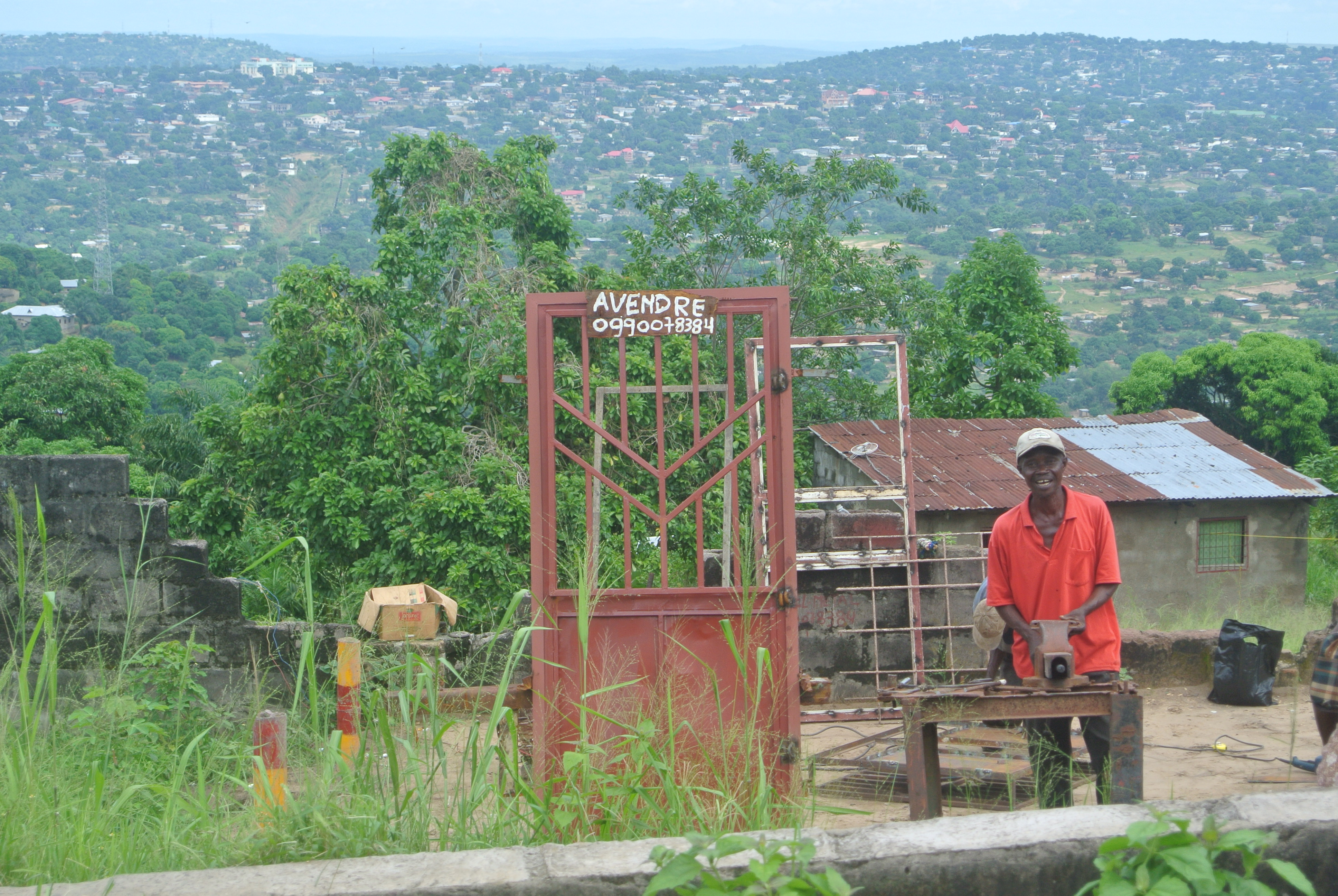 Kinshasa, République Démocratique du Congo - 2013